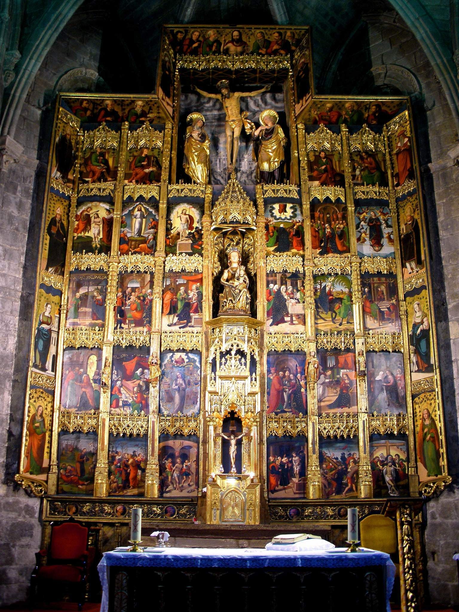 Retablo mayor de la iglesia de Santa María la Real de Olite (Navarra)